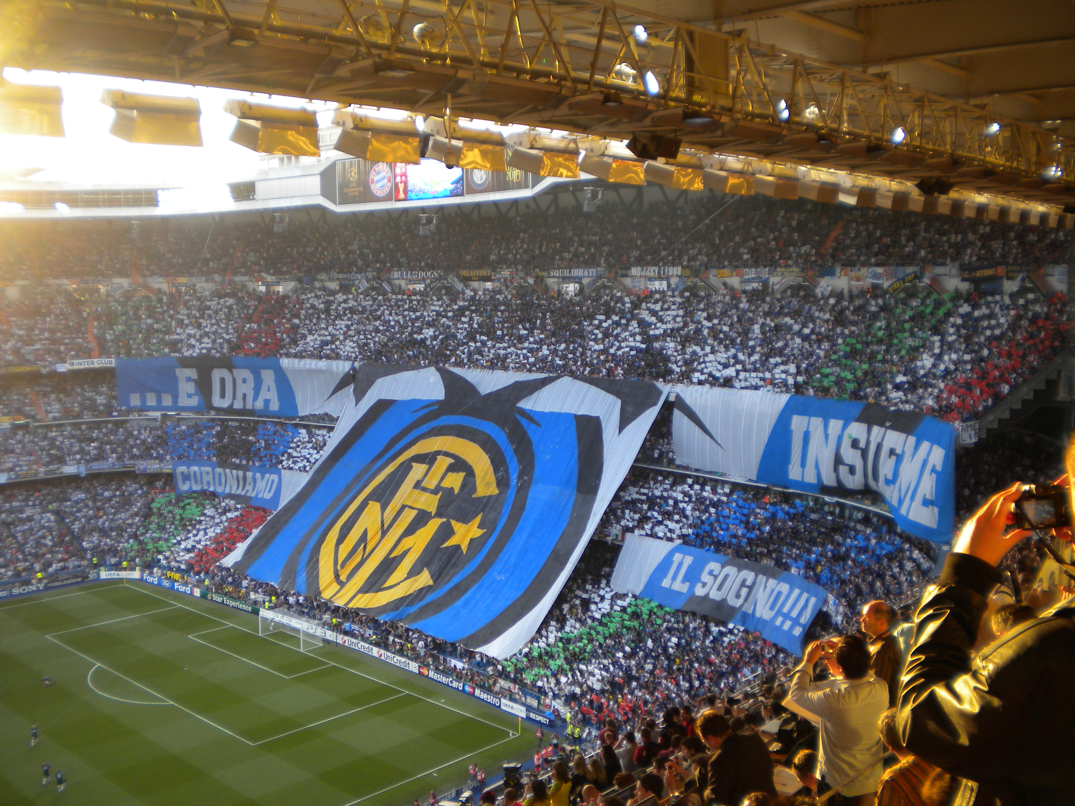 El fondo norte era italiano